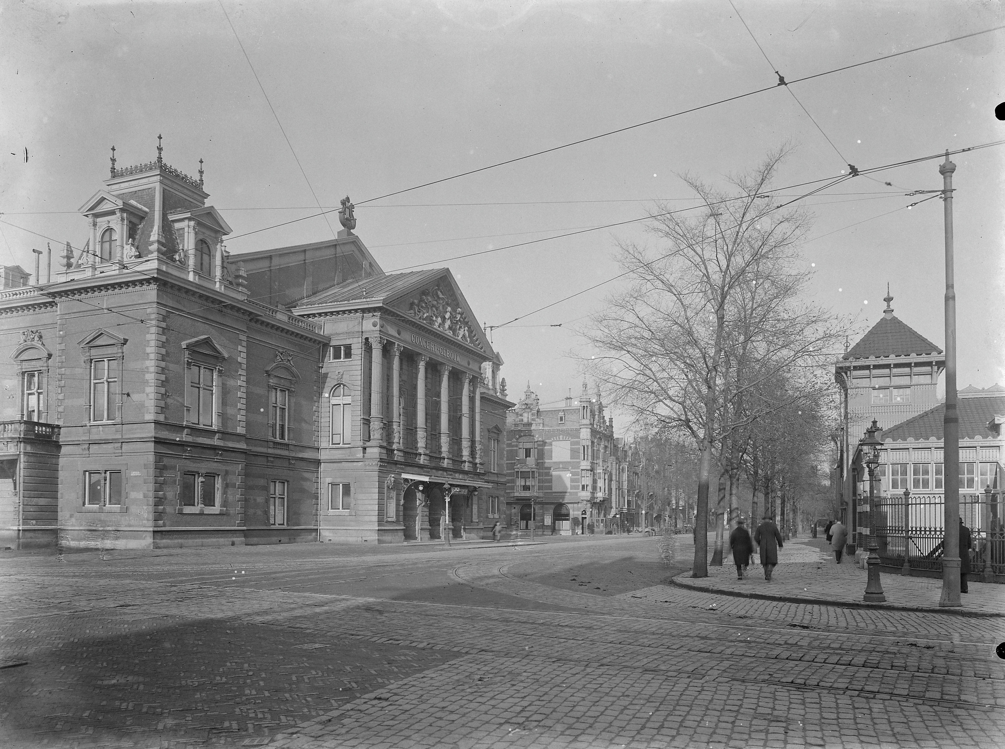 Concertgebouw: Voorgevel van het Concertgebouw met straatbeeld